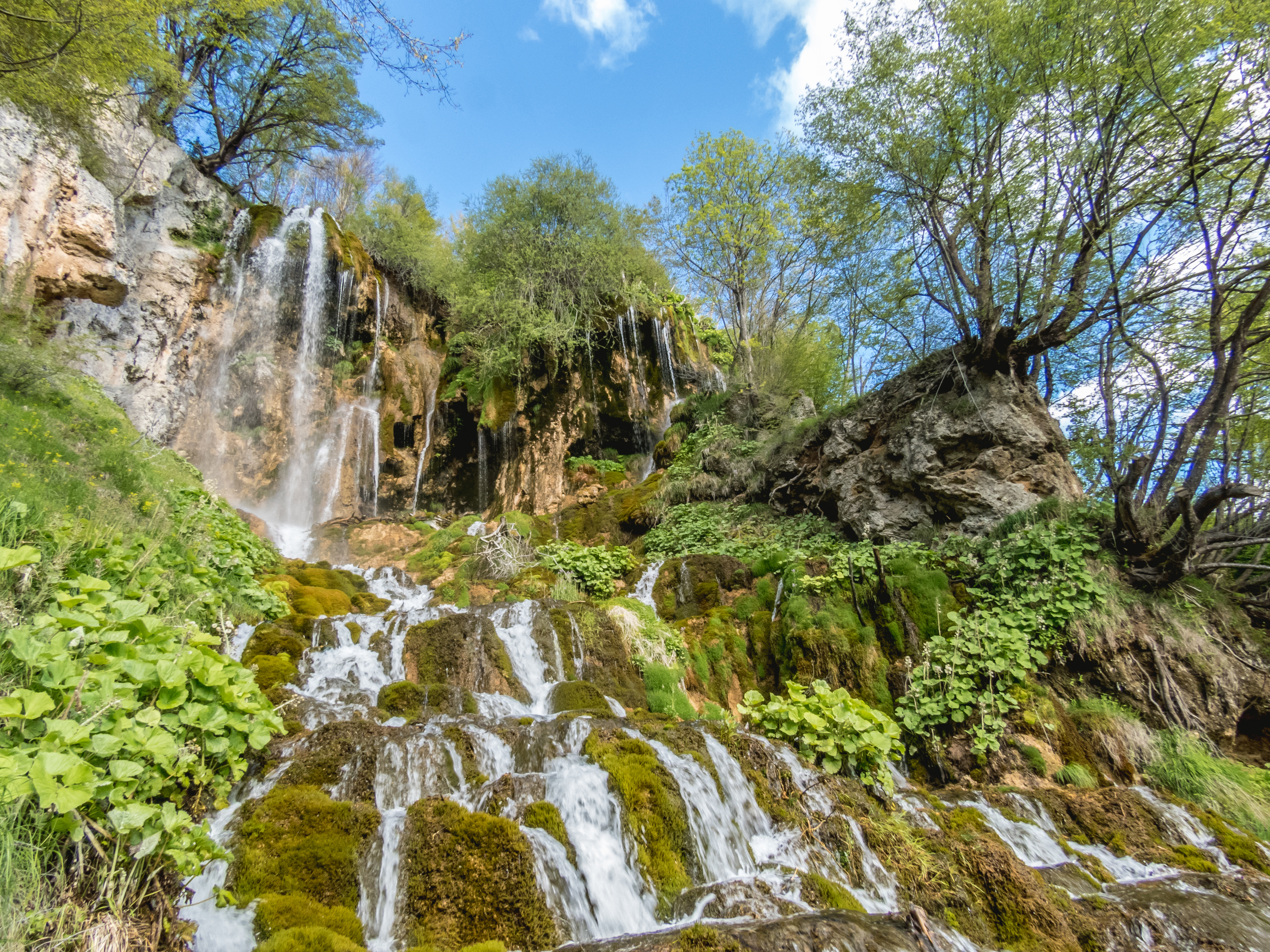 Споменик природе Слапови Сопотнице Ово је фотографија заштићеног природног добра у Србији под шифром: СП216This is a a photo of a natural area in Serbia with ID: СП216